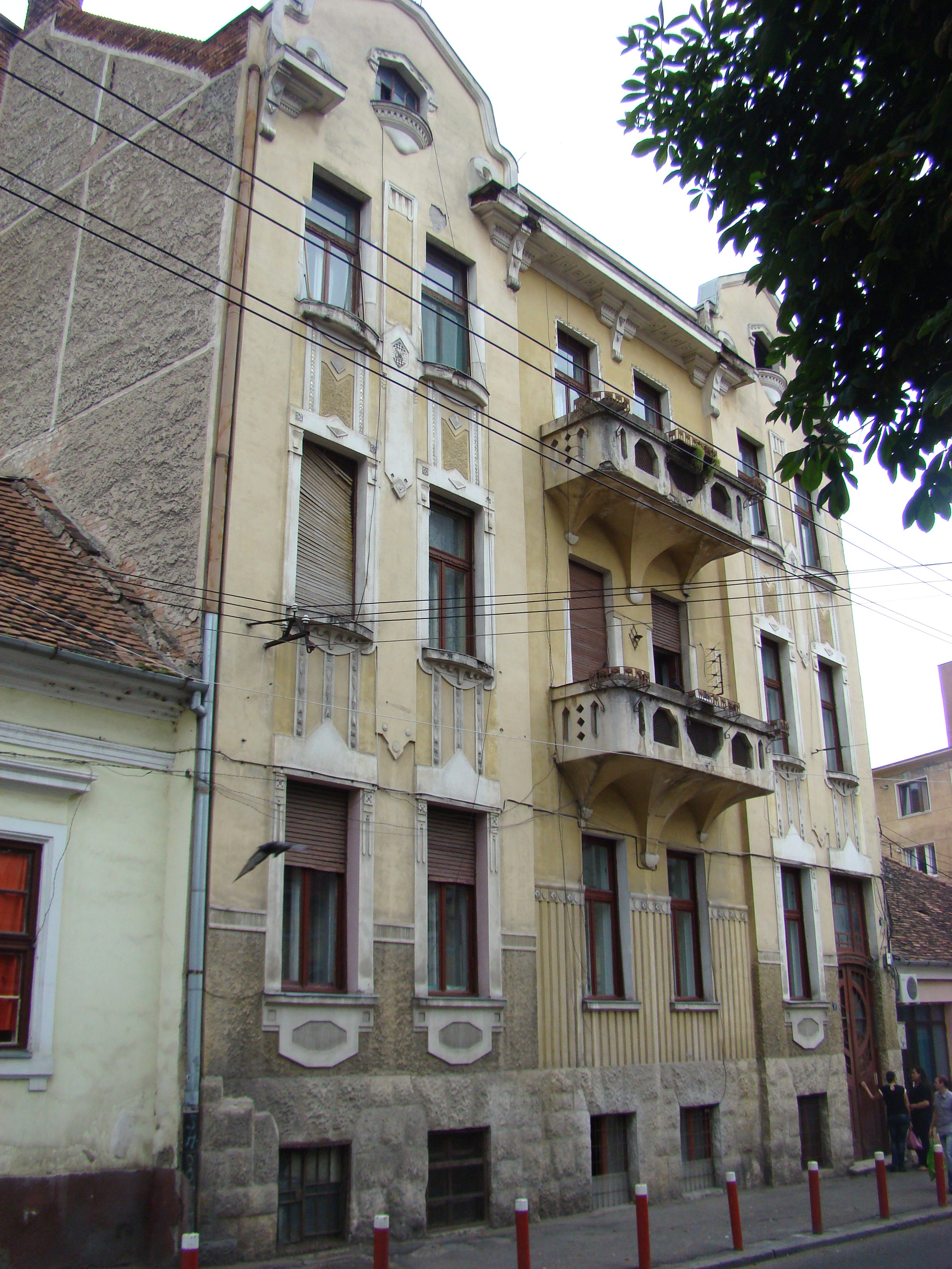 Clădire monument istoric, str.Frederic Joliot-Curie, nr.3